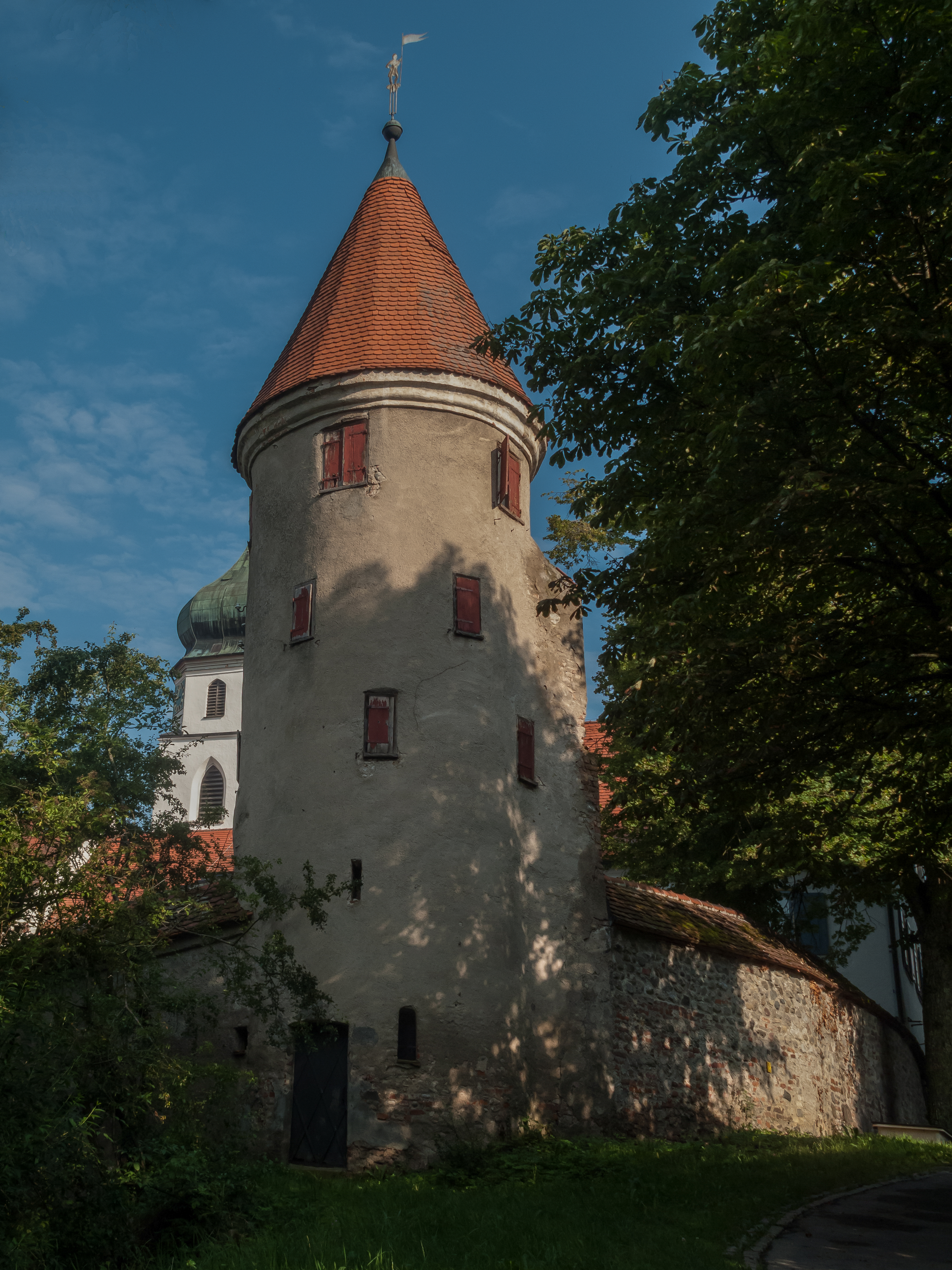 Leutkirch im Allgäu, der Pulverturm mit der Sankt Martins Kirche im Hintergrund